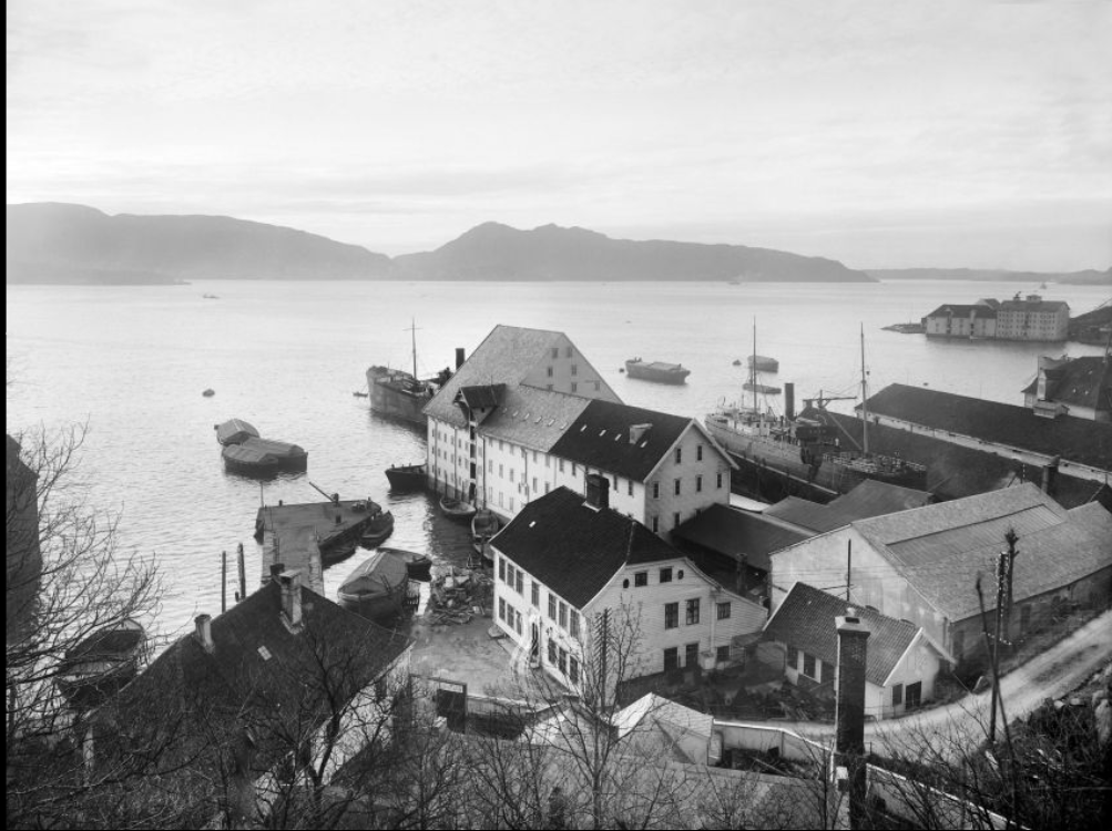 Storemøllens patentslip og mek. Verksted. University of Bergen Library, Avdeling for spesialsamlinger